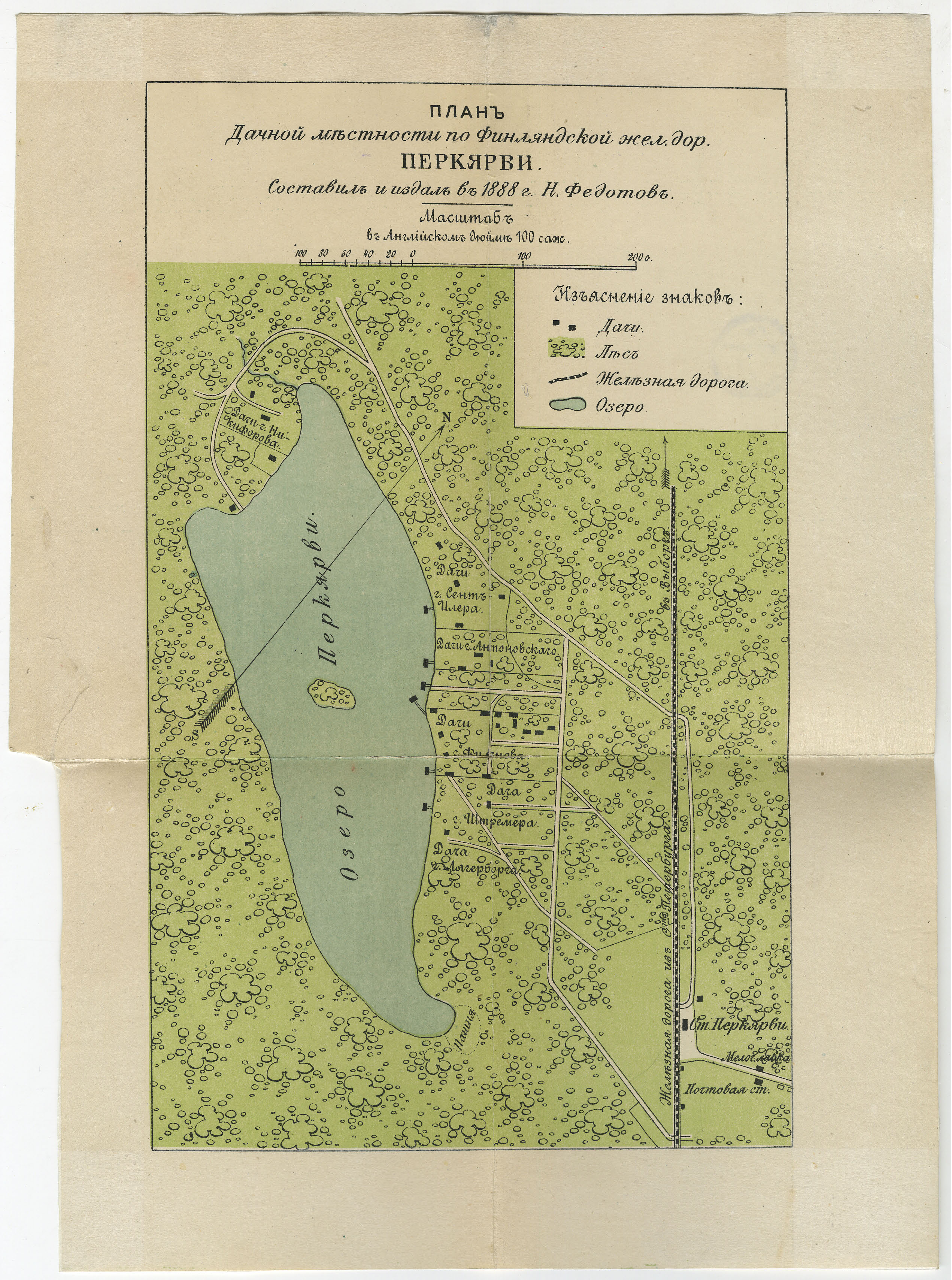 План Перкярви 1888 года